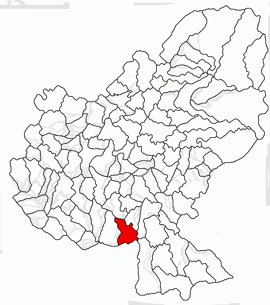 Categorie:Hărţi ale judeţului Mureş